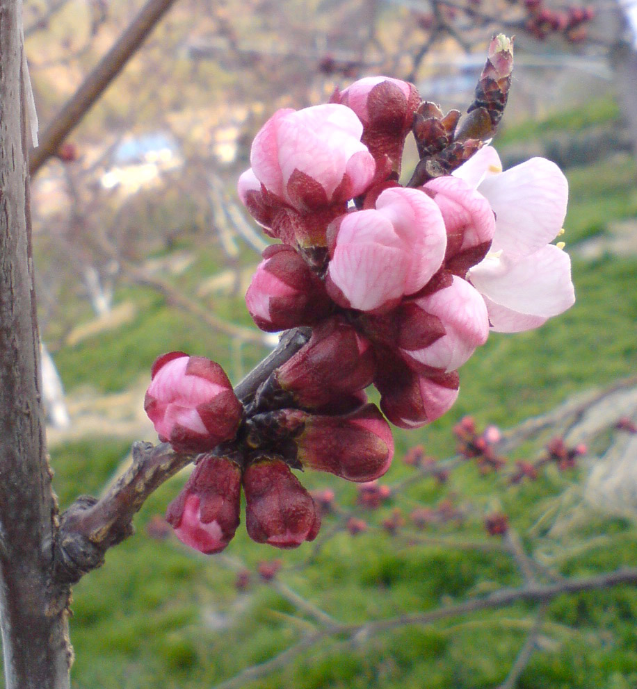 アンズの花 ハーコット種 (Nagano pref. Japan.)